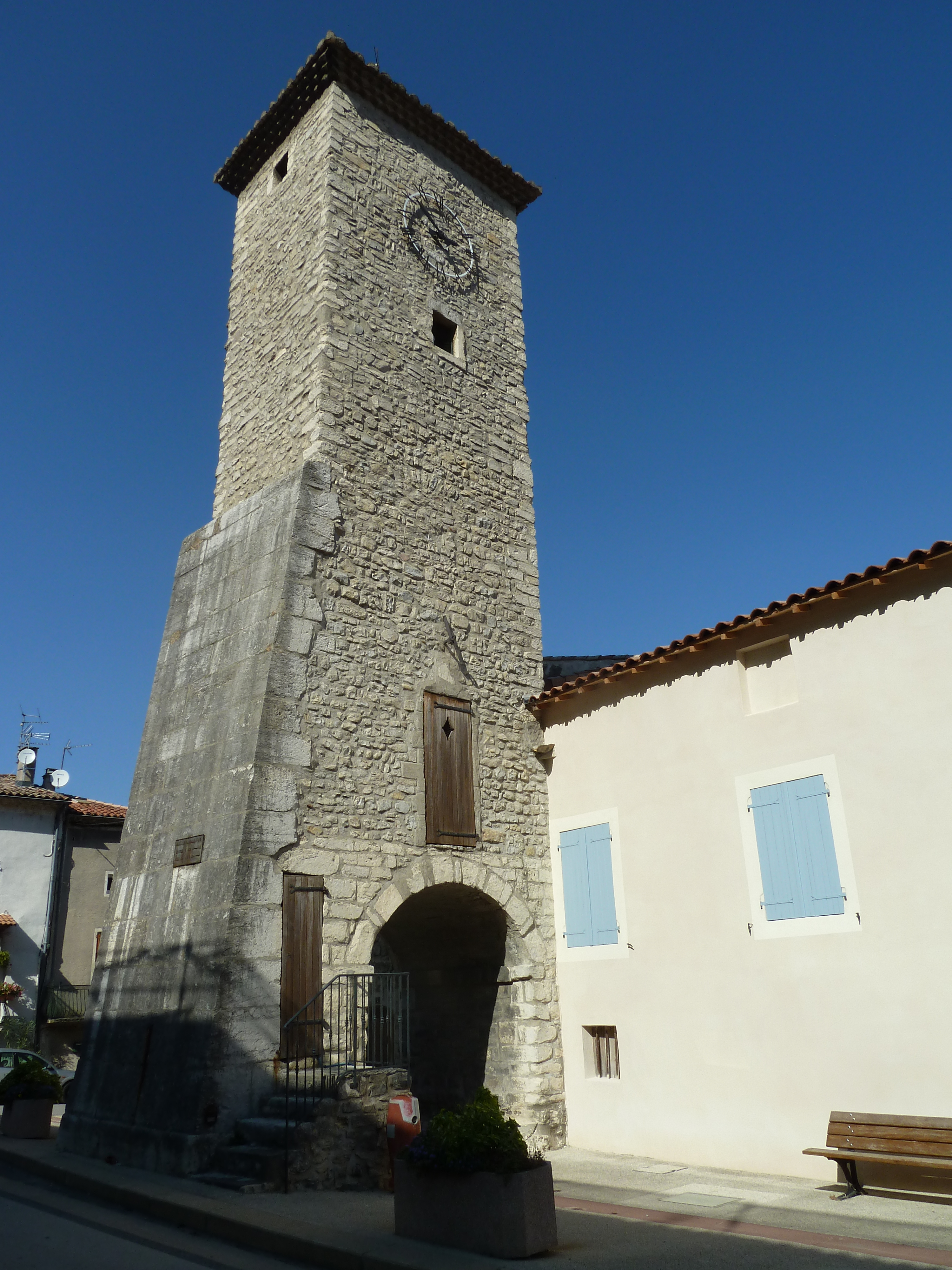 Tour de l'Horloge, (Inscrit, 1984)